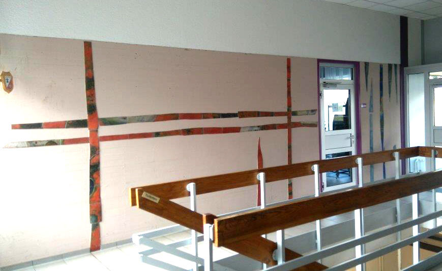 Wand-Keramik Harnest-Bampi in der Albkaserne Stetten